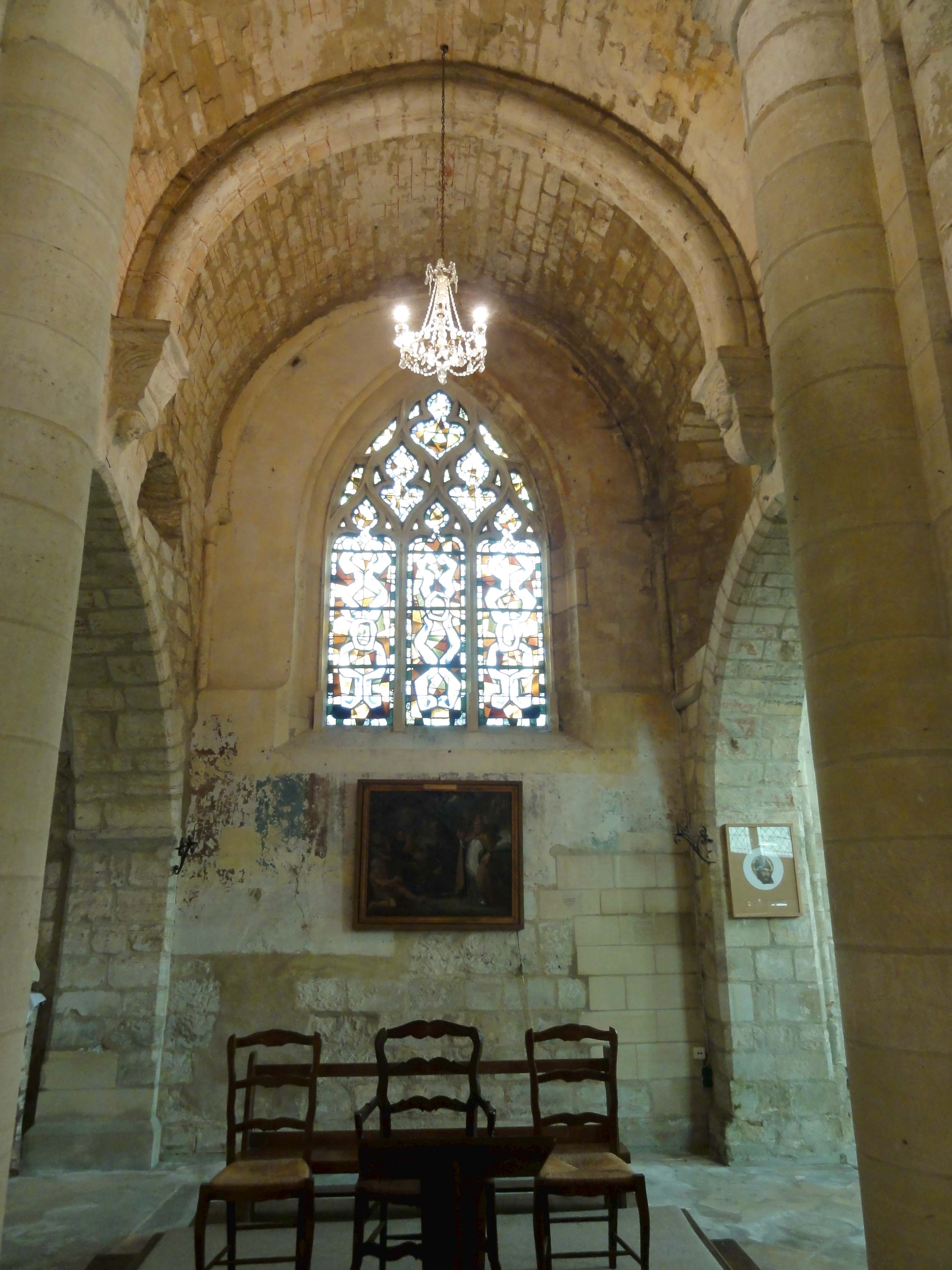 Intérieur de l'église (voir titre).